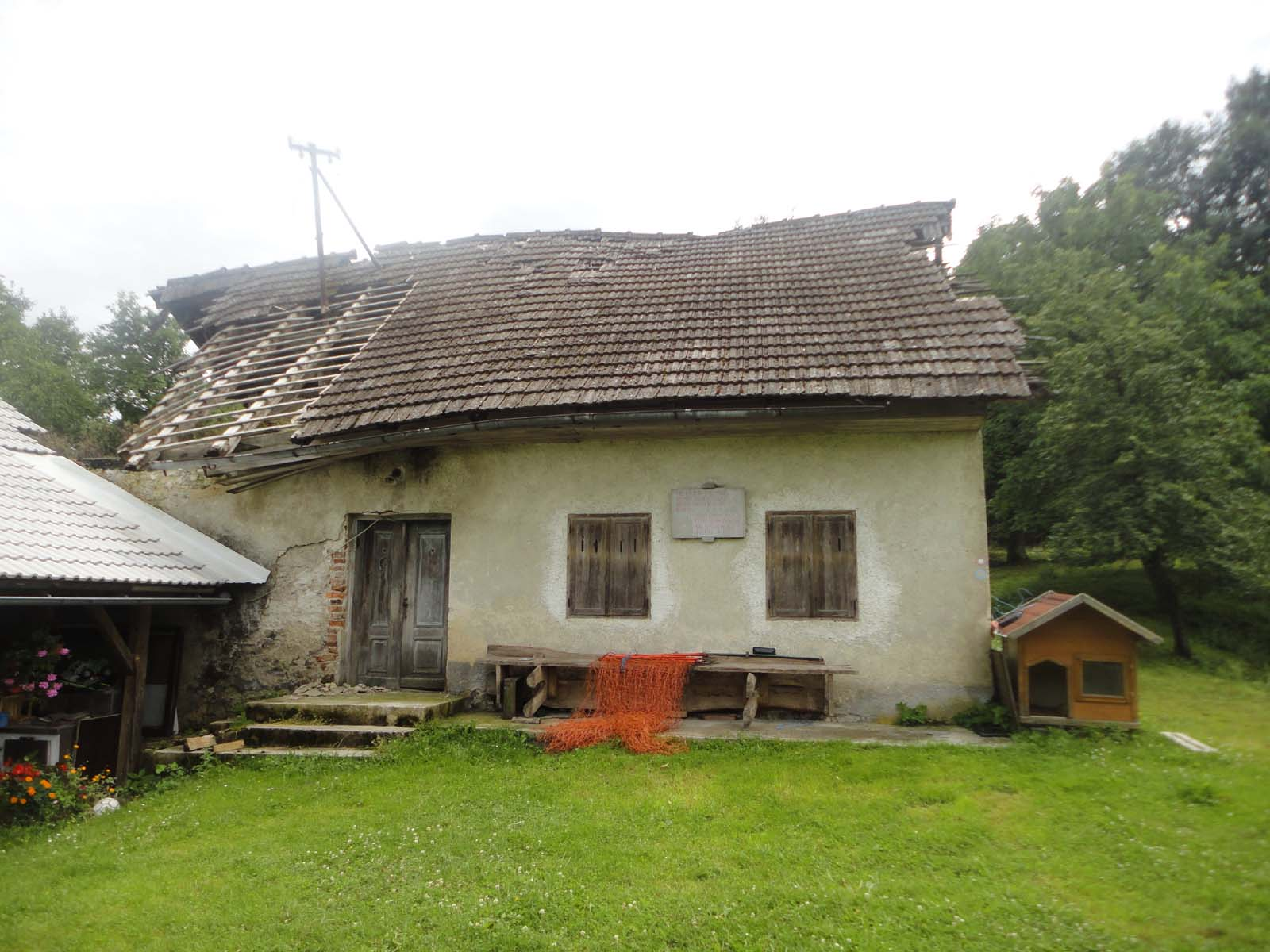 Hiša v Komarni vasi, edina stavba, ki je ostala v porušeni vasi. Danes je že skoraj propadla. Med drugo svetovno vojno je služila kot sedež uprave centralne bolnice partizanov.